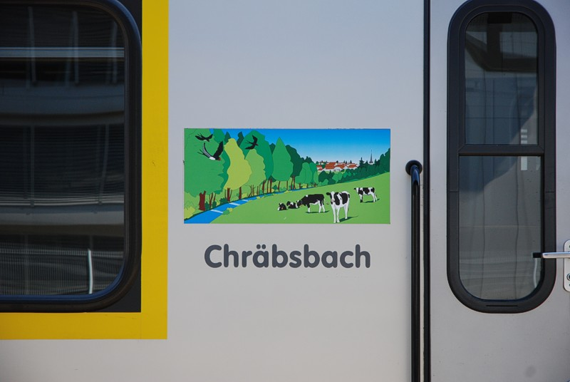 Taufname BLS RABe 525 026